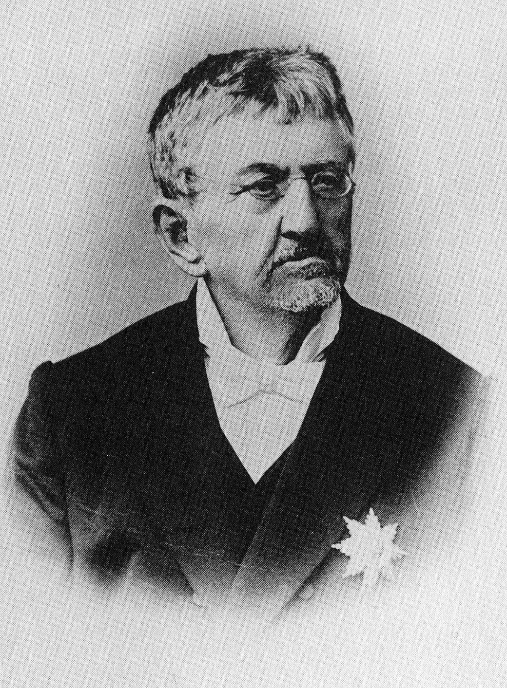 Den Emmanuel Servais porträtéiert vum Charles Bernhoeft.